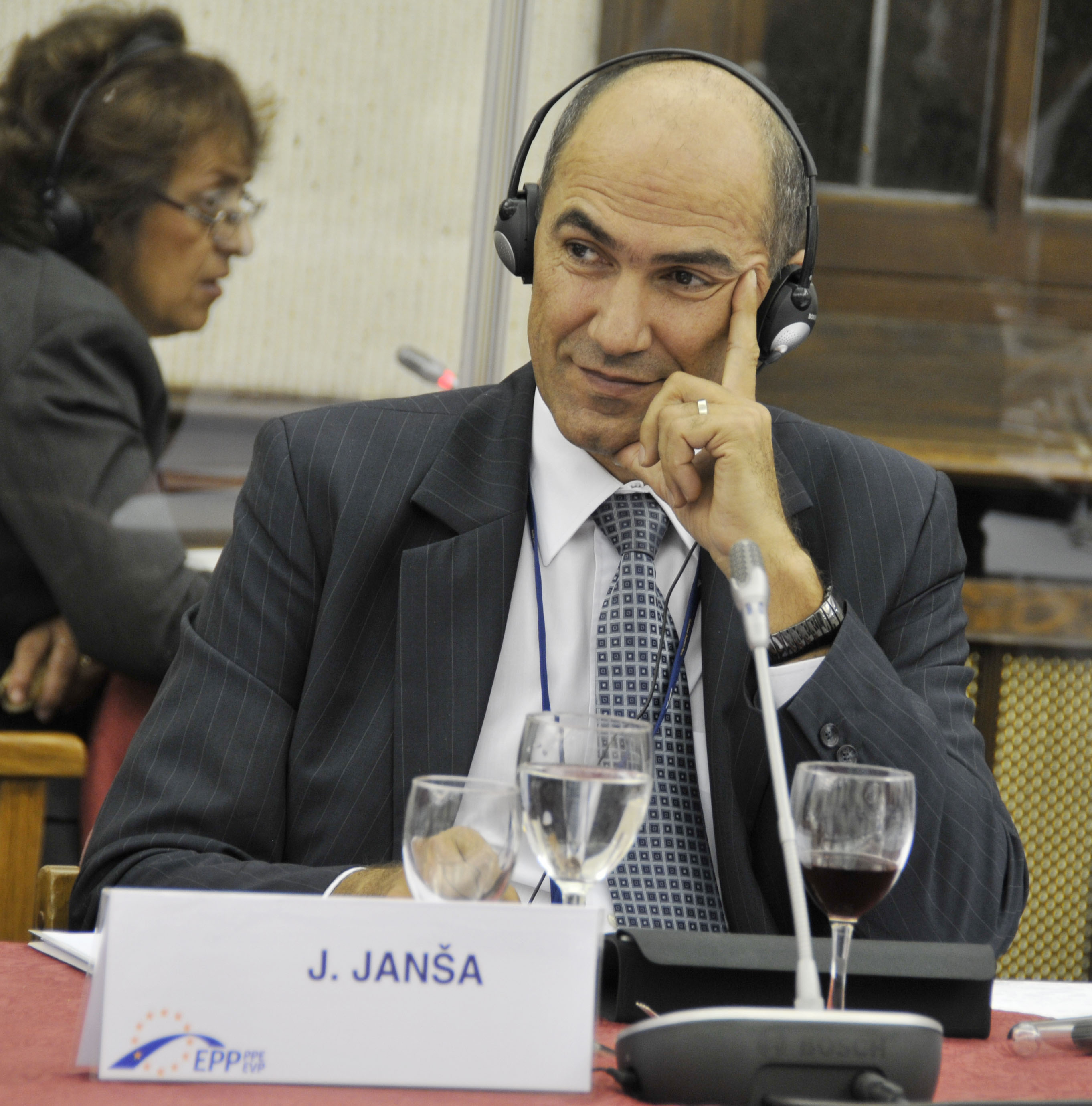 EPP_summit_533